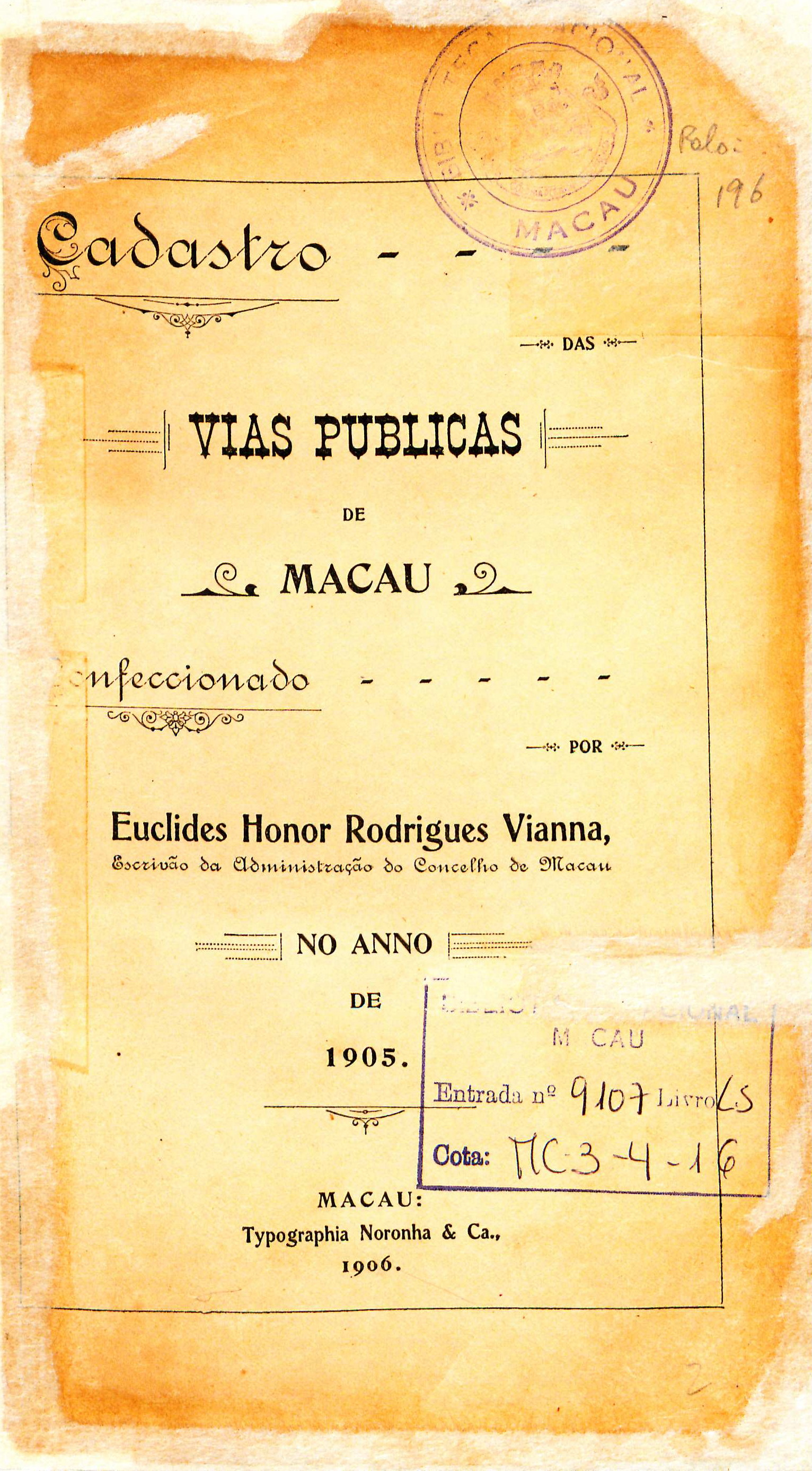 Cadastro das Vias Publicas de Macau